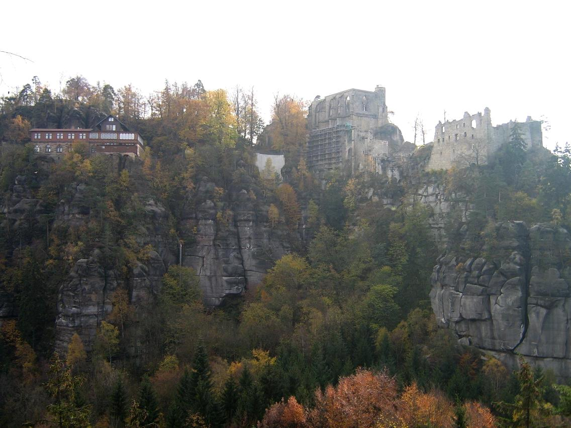 Das Kloster auf dem Oybin im Zittauer Gebirge